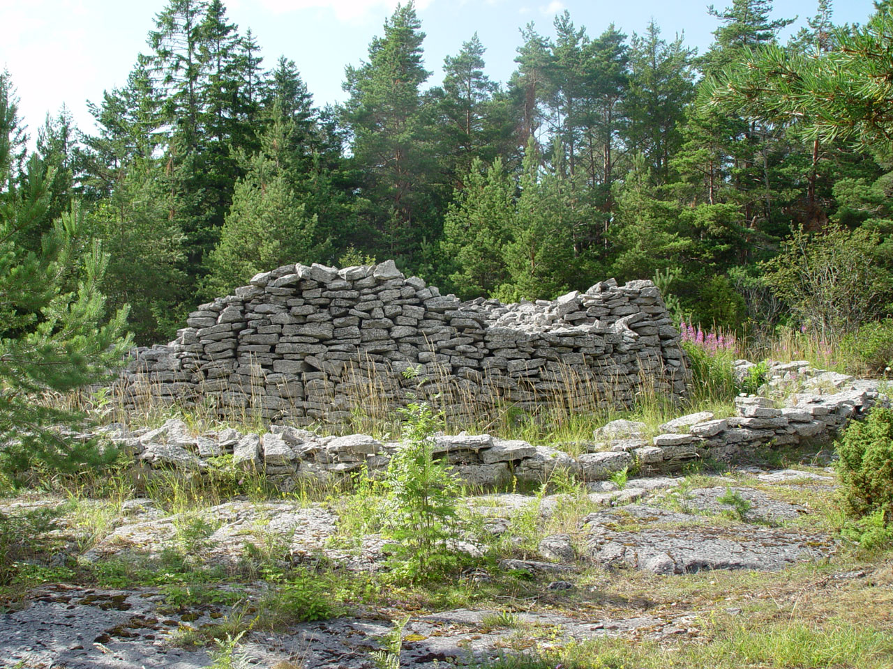 Gotland, Hügelgrab Kauparve (Ort:Gemeinde Lärbro). Einstige Höhe ca. 3m, Durchmesser 18m